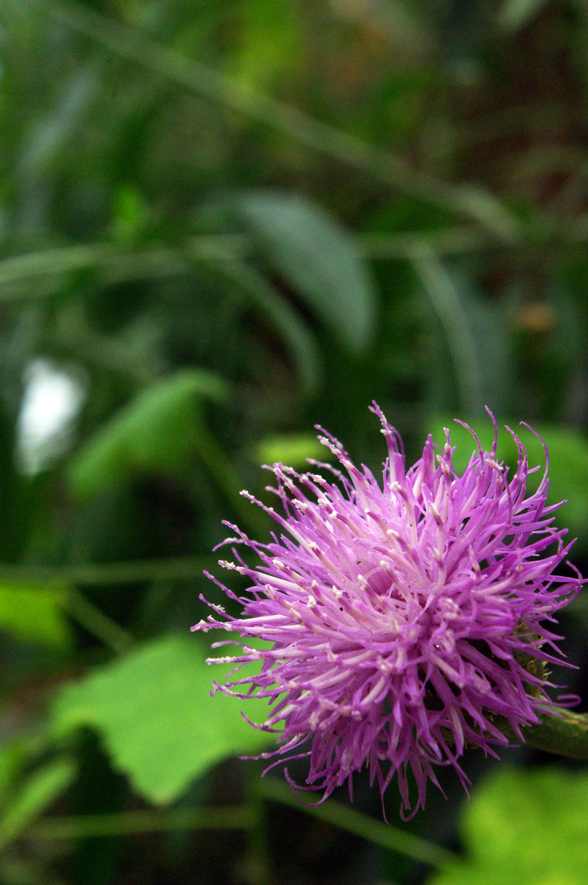 Fleur de Cheirolophus massonianus du Conservatoire botanique national de Brest.